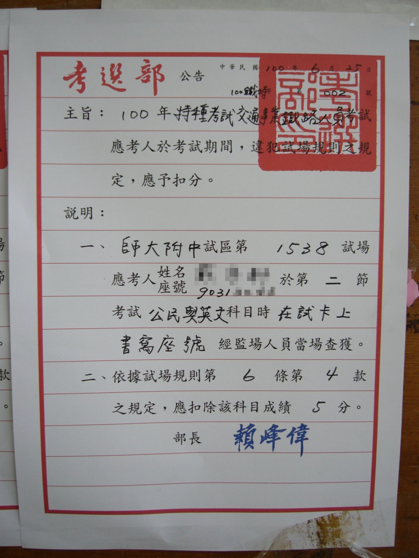 中華民國100年特種考試交通事業鐵路人員考試臺北考區師大附中試區應考人違規公告。